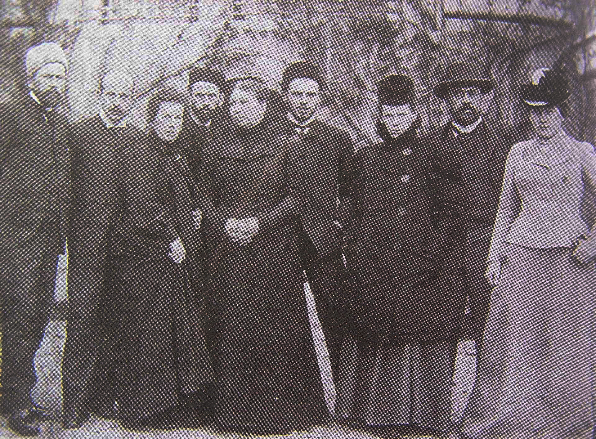 Da sinistra: Sergej, Andrej, Tat'jana, Lev junior, Sof'ja, Michail, Marija, Il'ja, Aleksandra